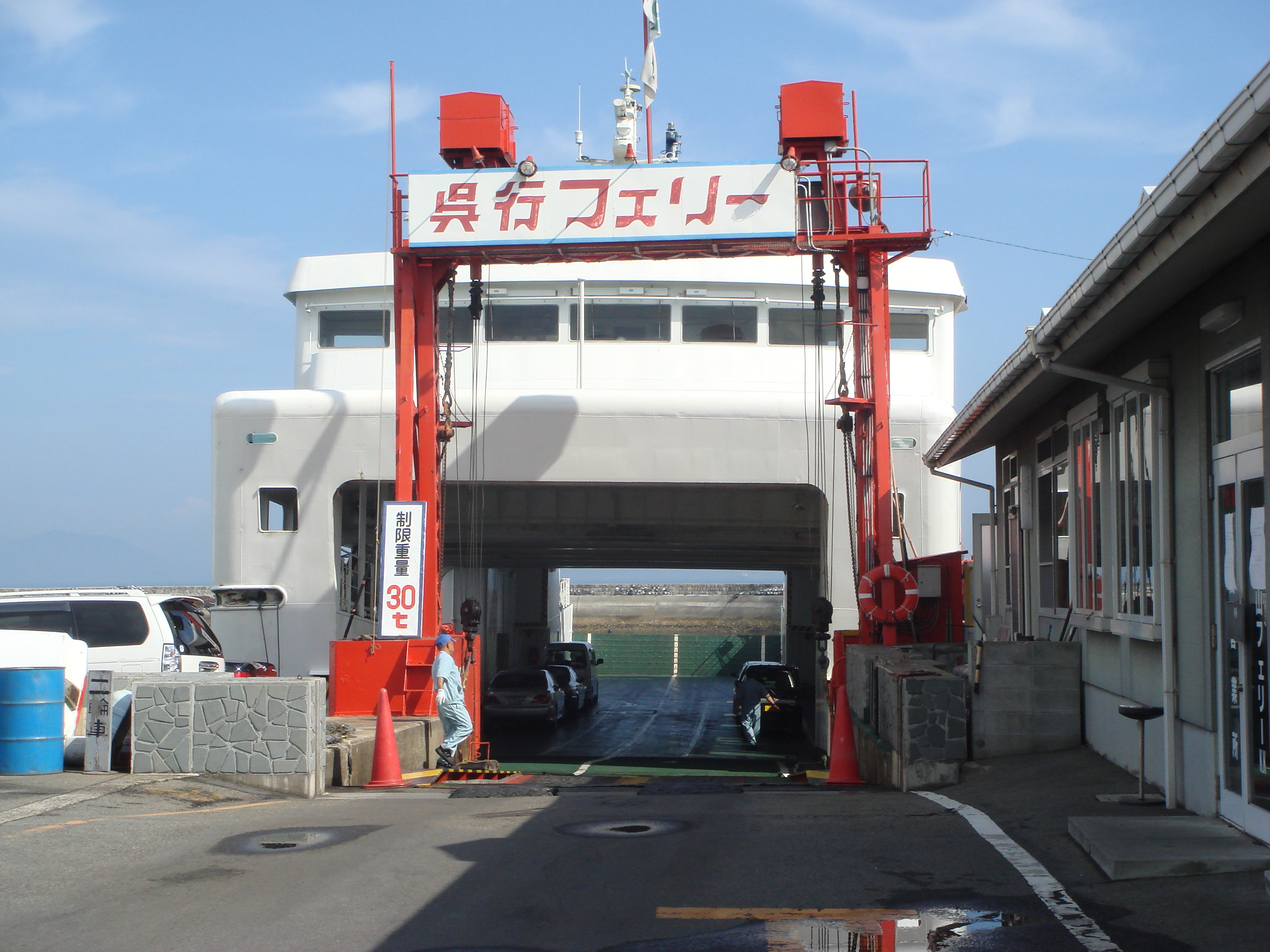 堀江港に停泊している呉・松山フェリー